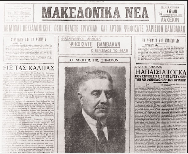 Първа страница на вестник "Македоника Неа".